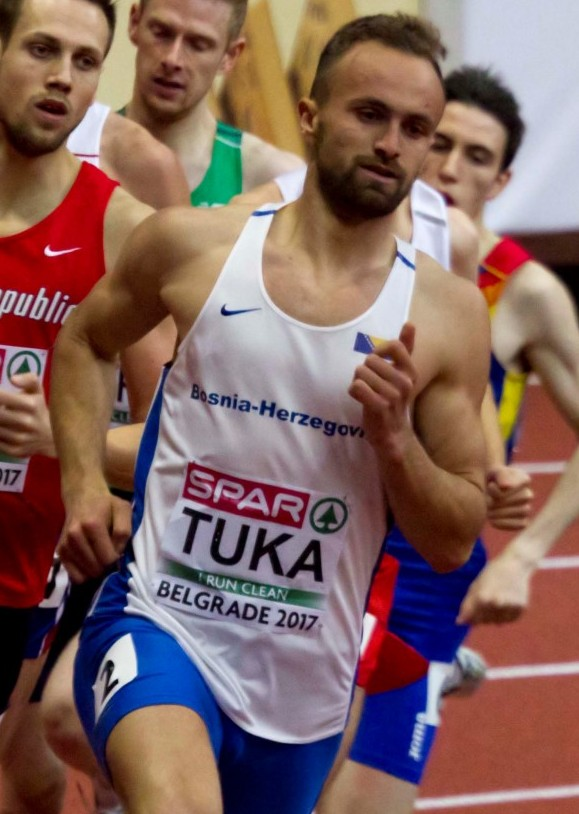 _083 800m series tuka